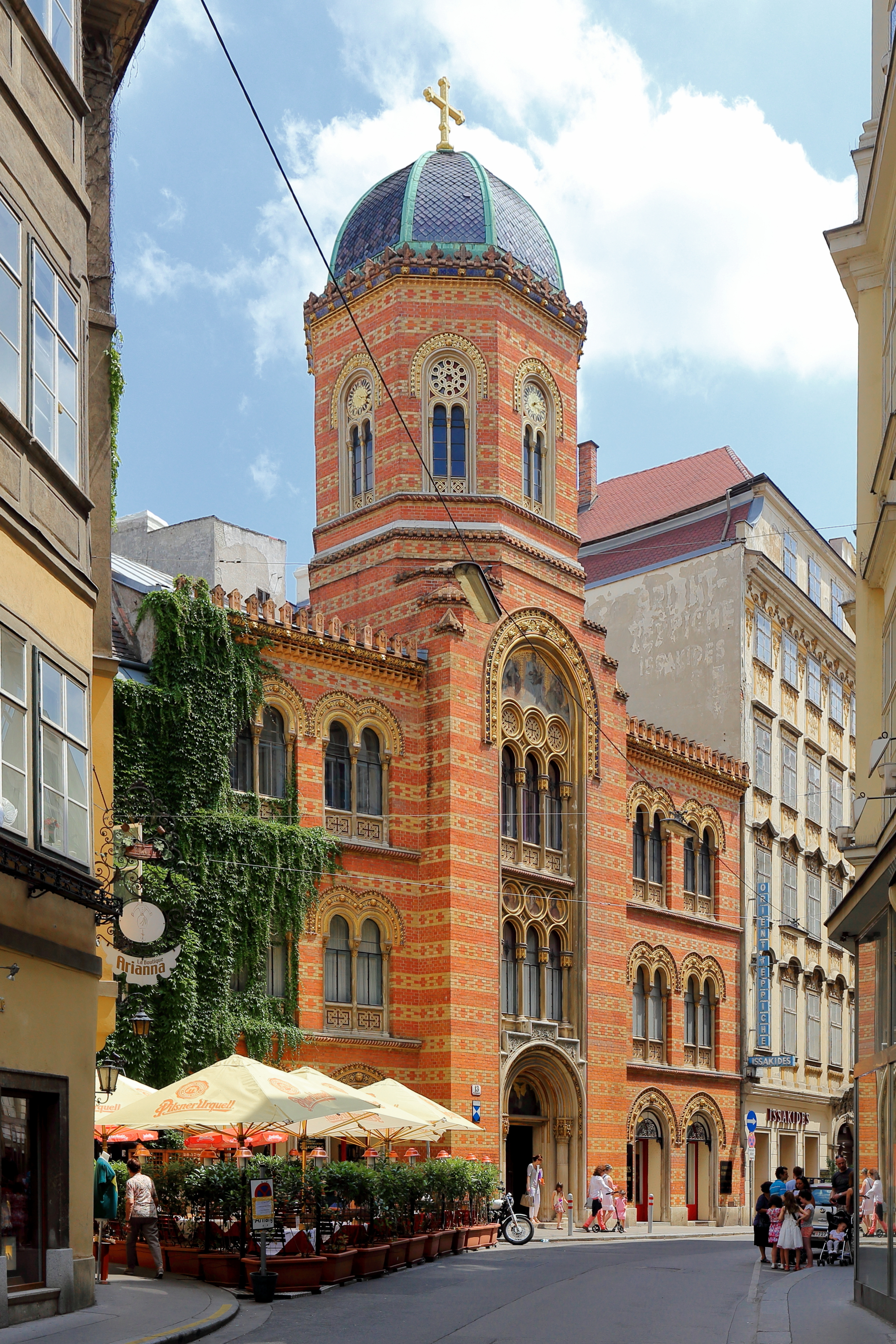 Die Griechenkirche zur Heiligen Dreifaltigkeit im 1. Wiener Gemeindebezirk Innere Stadt.Die Kirche wurde von Peter Mollner in den Jahren 1782 bis 1787 errichtet und von 1858 bis 1861 nach einem Entwurf von Theophil von Hansen um einen in byzantinischen Formen gehaltenen Vorbau erweitert.